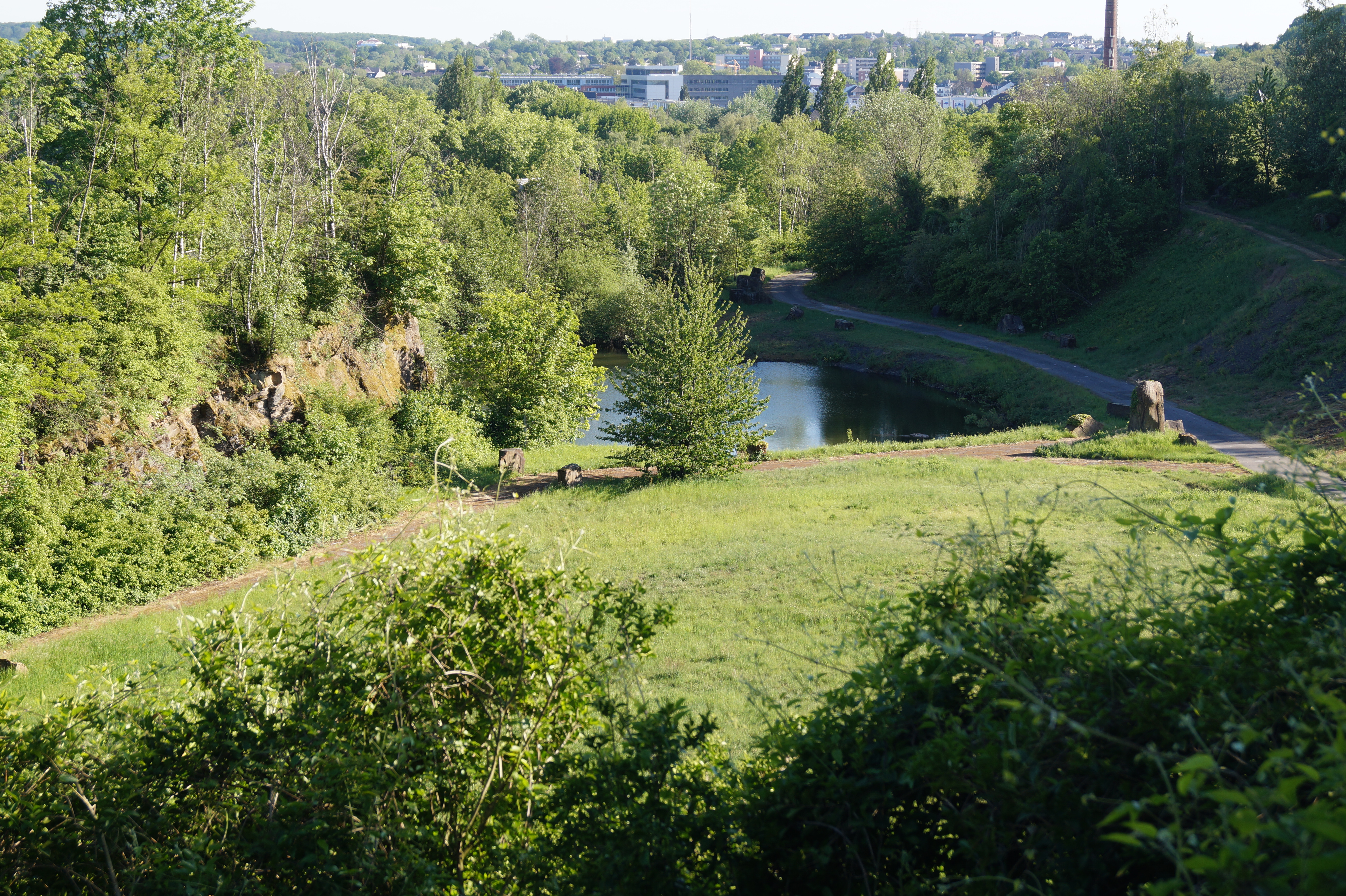 Blick auf Werksgelände Steinbruch Rauen in Mülheim an der Ruhr